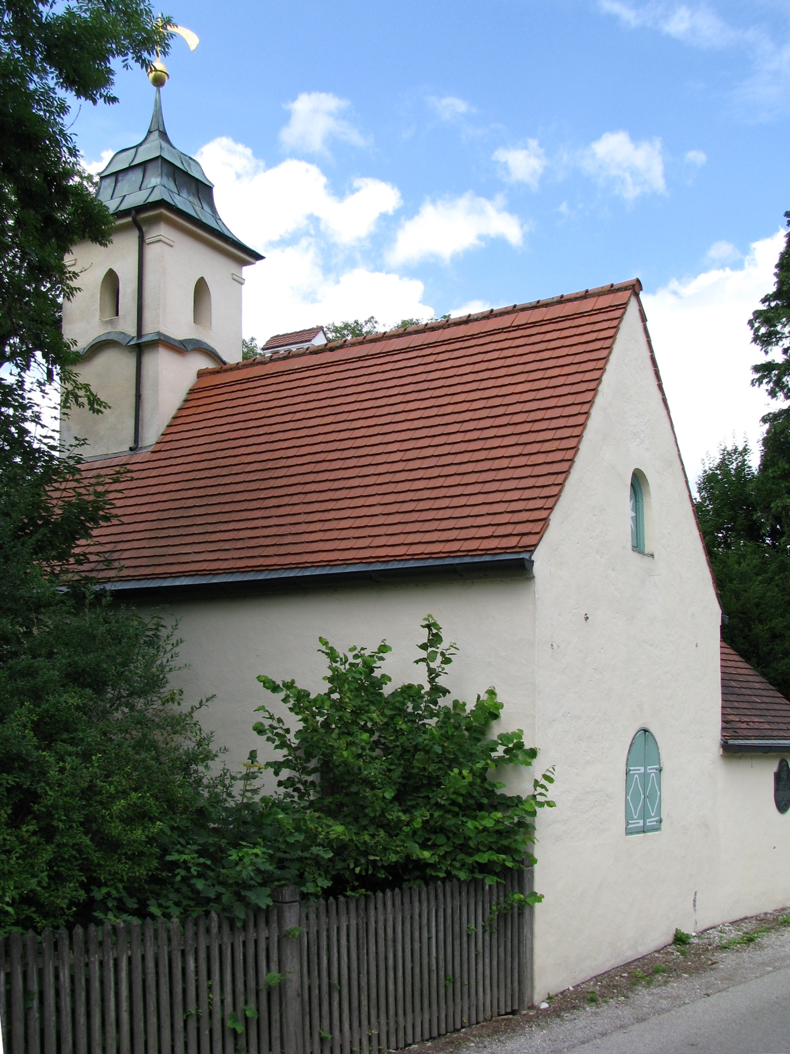 Ammerland Nördliche Seestraße 11; Schlosskapelle Hl. Drei Könige